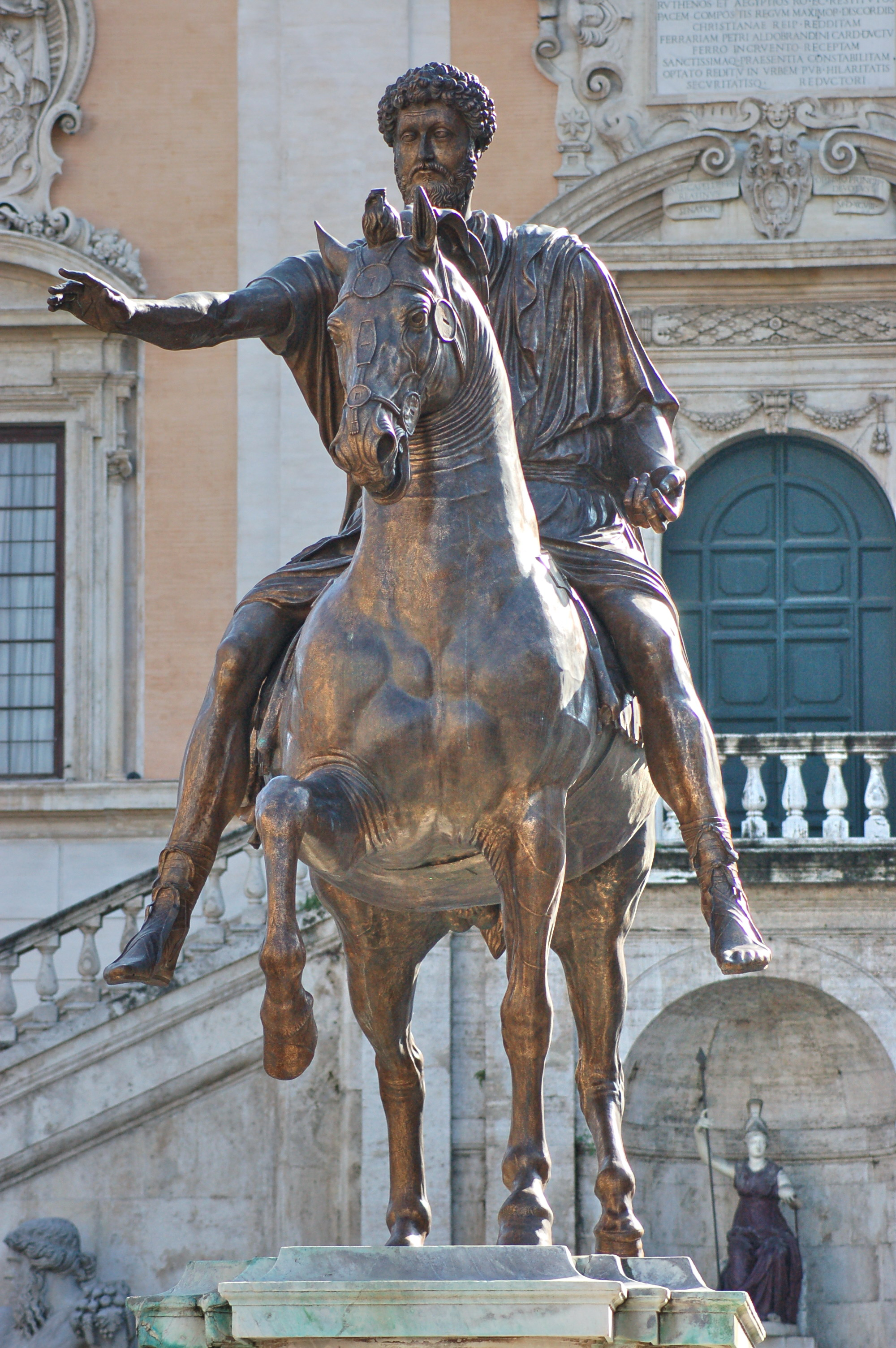 Statua dell'imperatore Marc'Aurelio sulla Piazza del Campidoglio a Roma